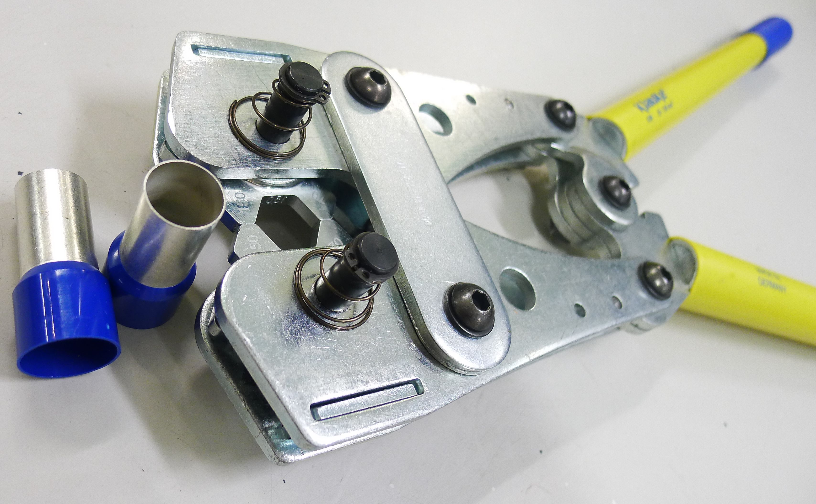 Klauke krimptang voor adereindhulzen van 60 tot 150 qmm, beschikbaar gesteld door Technische Unie te Arnhem voor een foto.